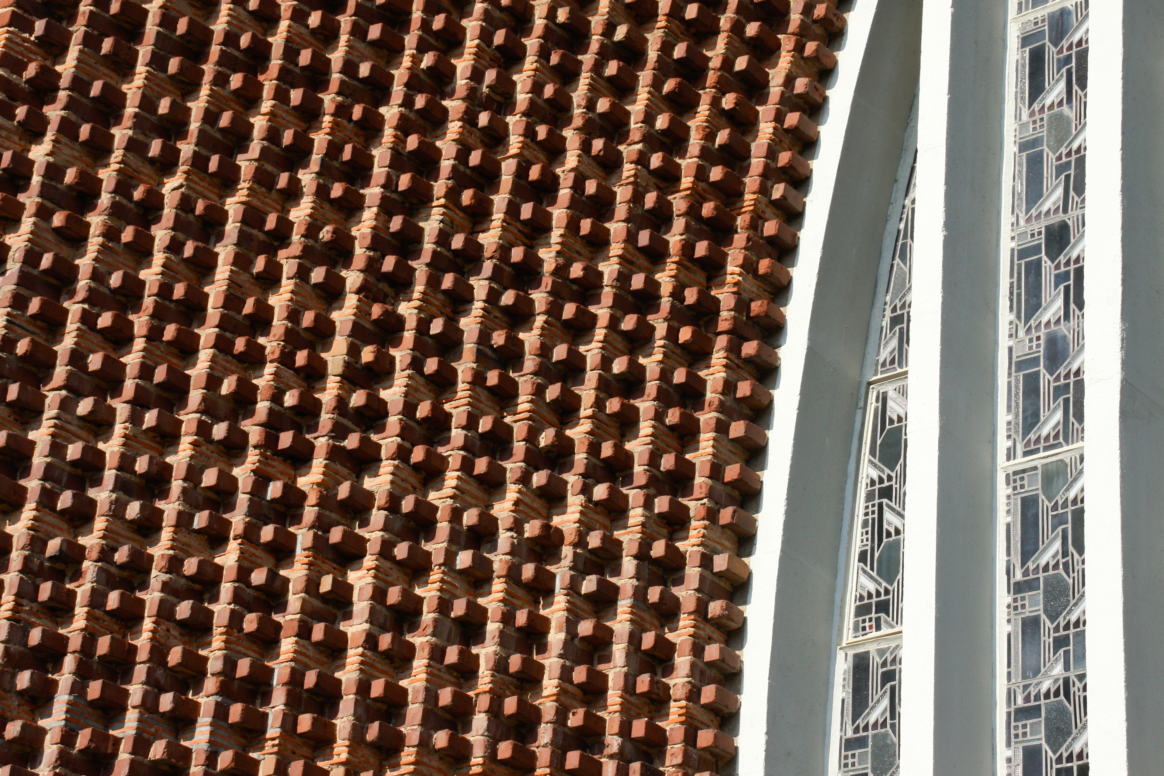 Bischofsheim, Christkönig-Kirche, Dominikus Böhm 1926. Detail der Laibung in der Portalnische